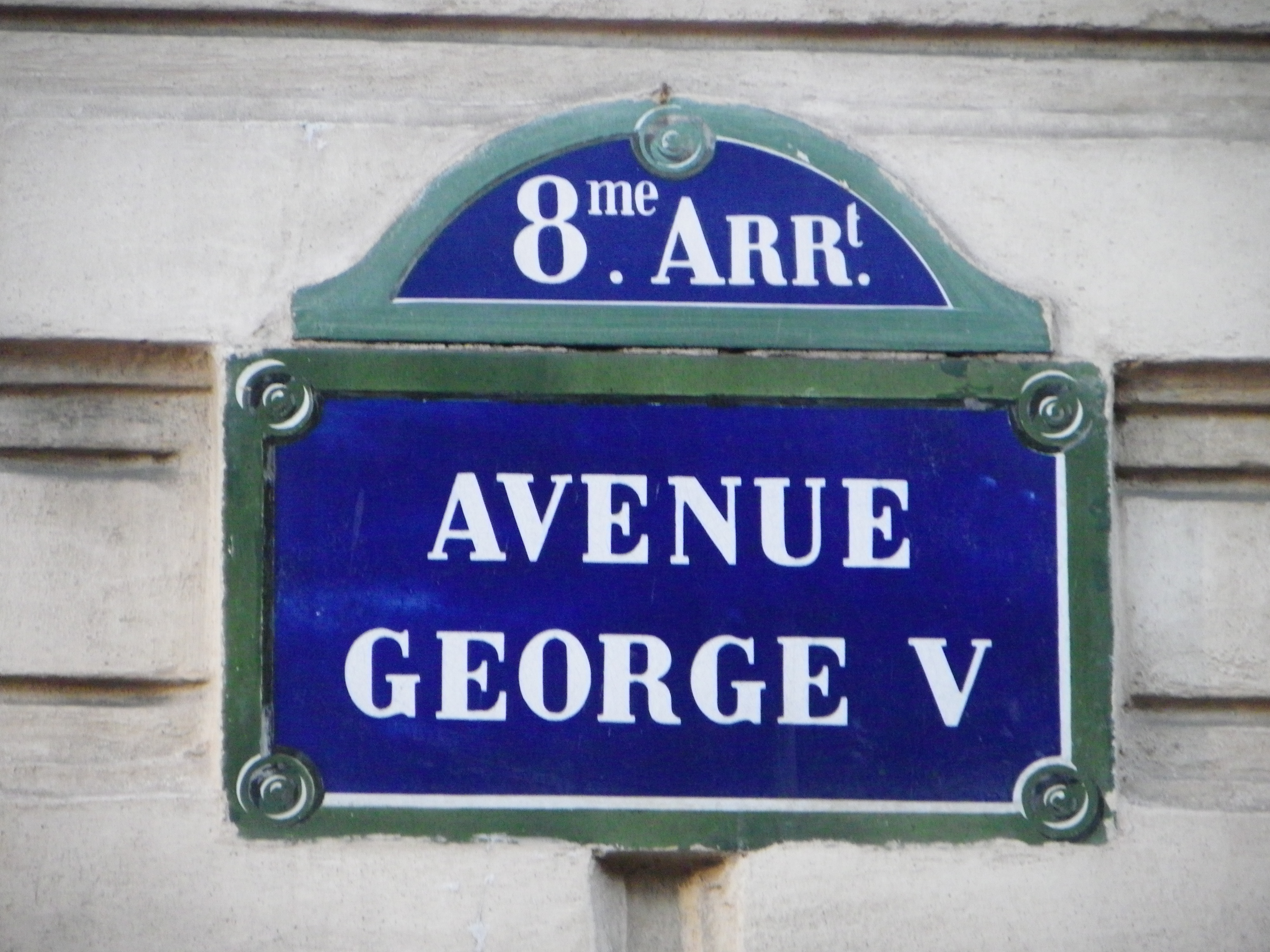 Plaque de l'avenue Georges V à Paris